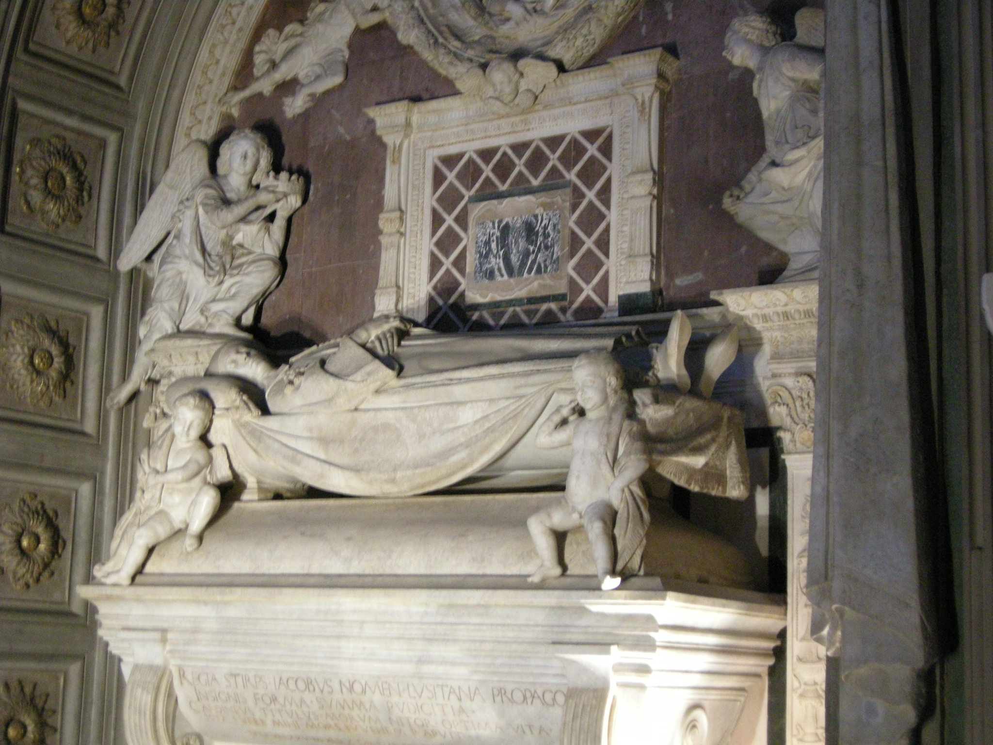 Una dei piu importante tombe della prima rinascimento